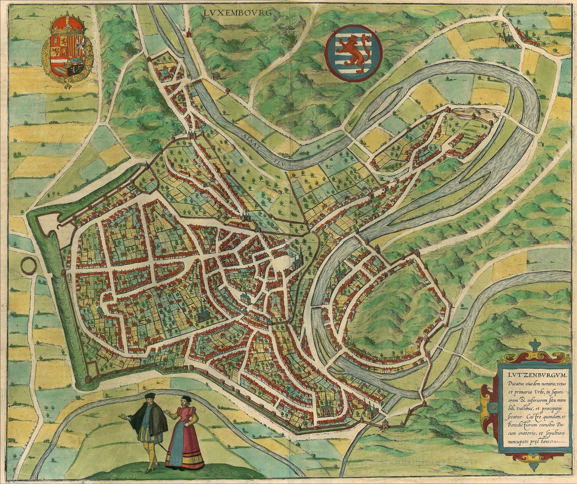 Lutzenburg